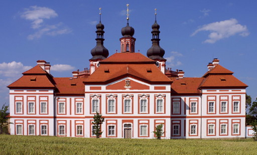 Jižní průčelí proboštství Mariánské Týnice, barokní stavba dle projektu J. B. Santini-Aichela